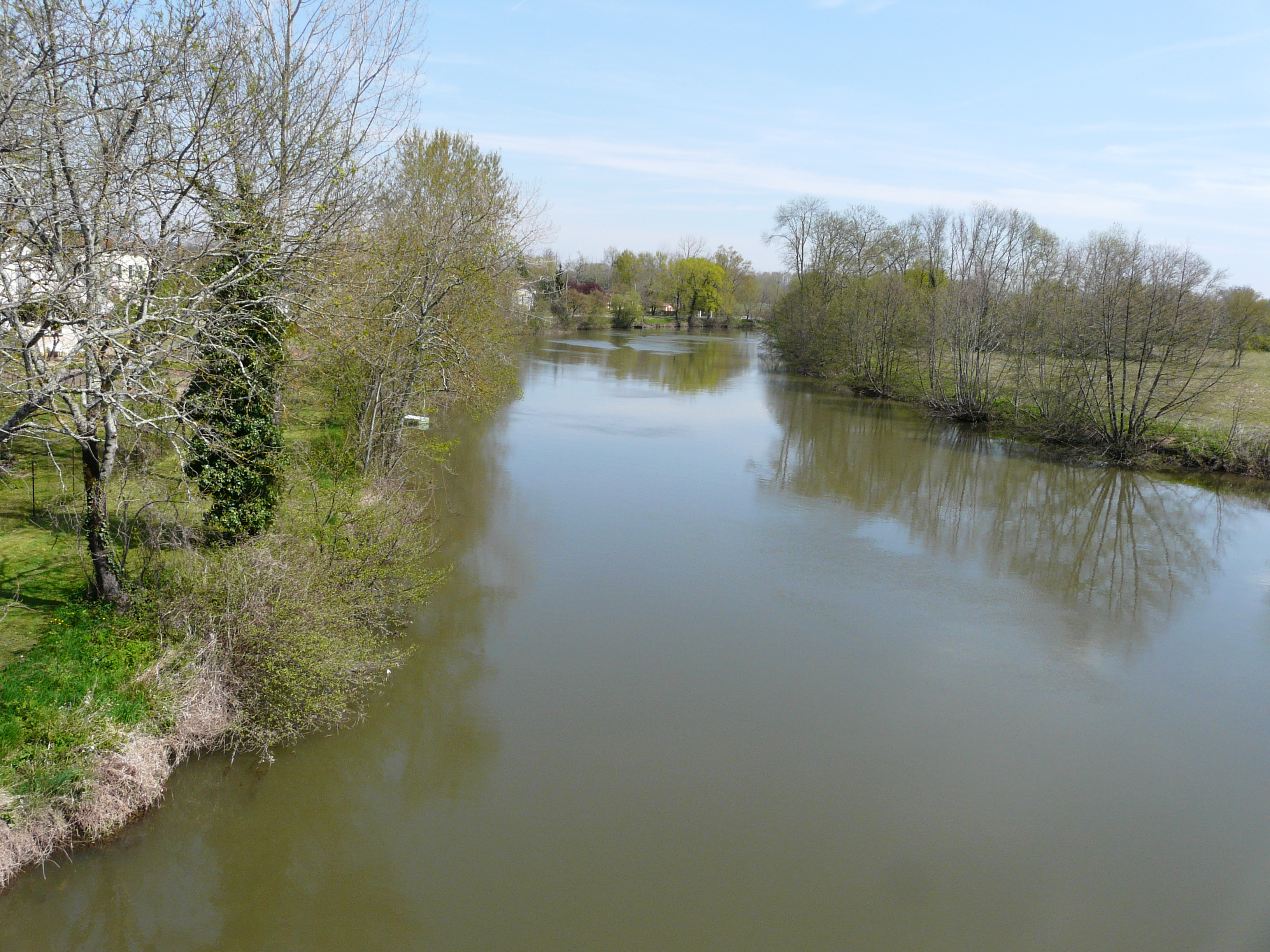 L'Isle en amont du pont de la route départementale 10 entre Le Pizou (à gauche) et Moulin-Neuf (à droite), Dordogne, France.